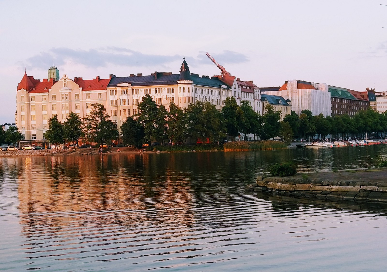 Eläintarhanlahti ja Säästöpankinranta Tokoinrannasta katsottuna